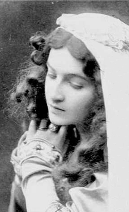 Maria Kuznetsova as Elsa in Richard Wagner's Lohengrin